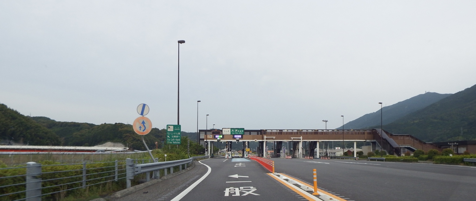 大洲インターチェンジ